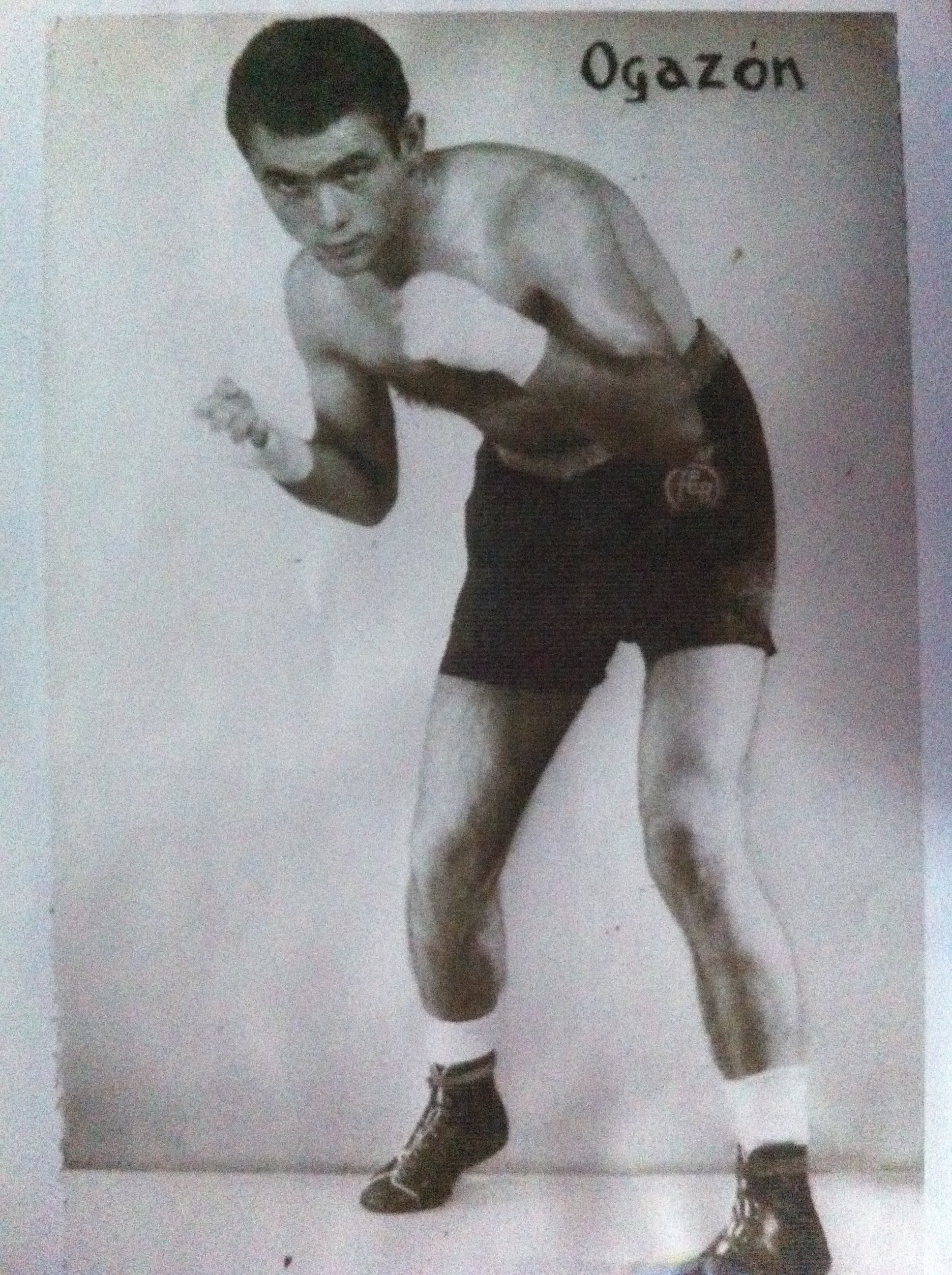 José Ogazón Fernández